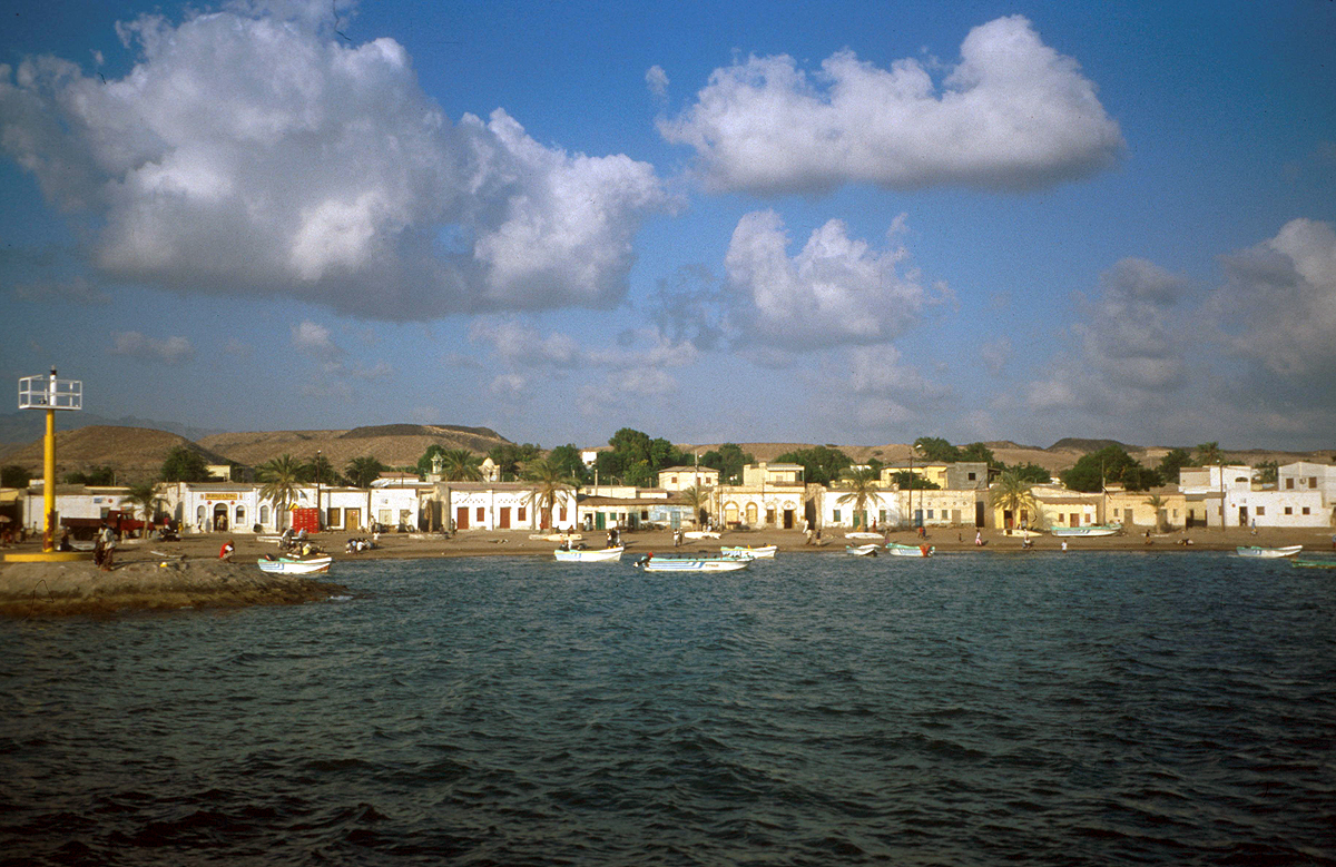 Die Stadt Tadjoura in Dschibuti, Blick vom Meer